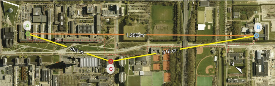 Campus de la universidad de Delft, donde se realizó el experimento de Hanson et al.(2015)